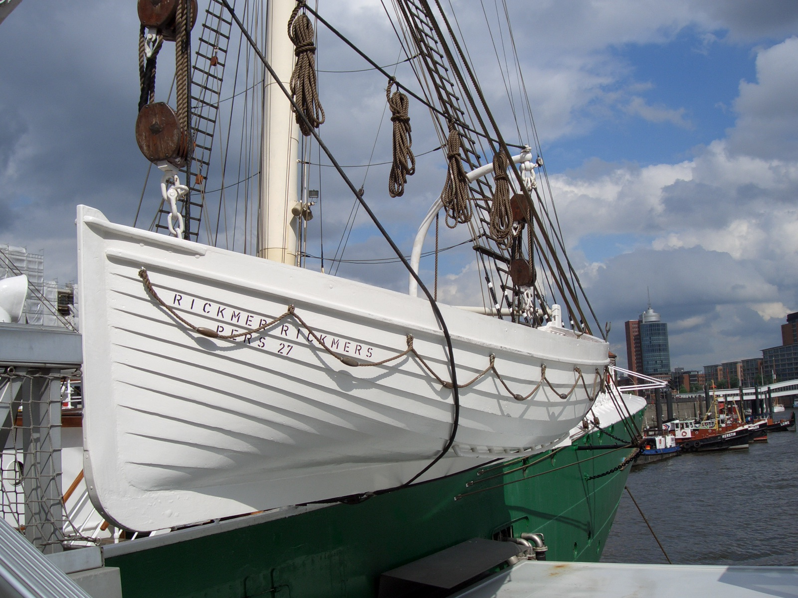 Rettungsboot der Rickmer Rickmers. Fotograf: Seebeer. Datum: 31.05.2005